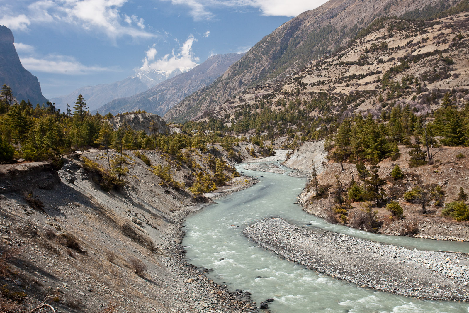 Marsyangdi valley near Pisang